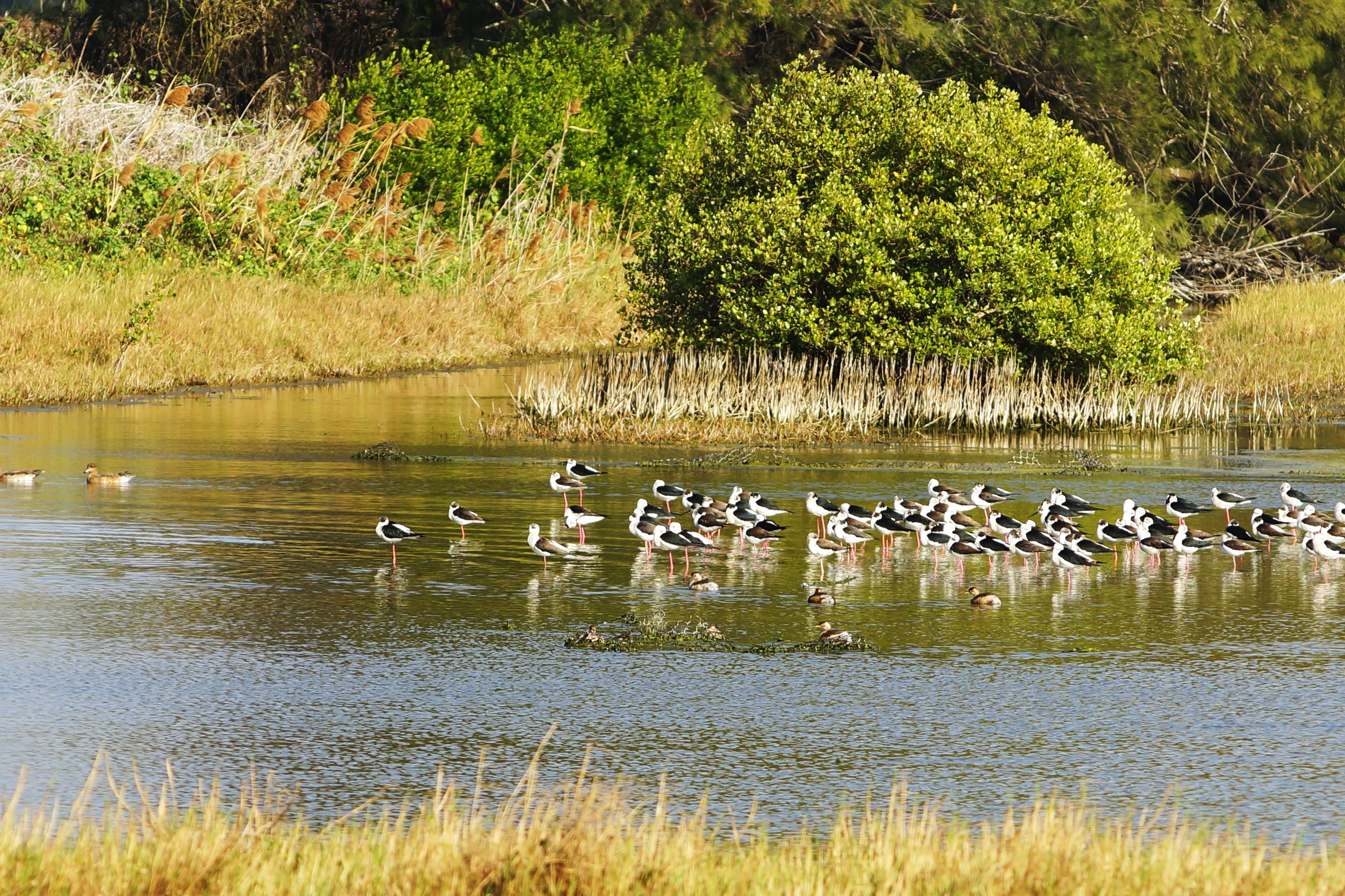 中文（台灣）: 廣闊的嘉義沿海鰲鼓溼地.保留著天然的環境.賞鳥好地方